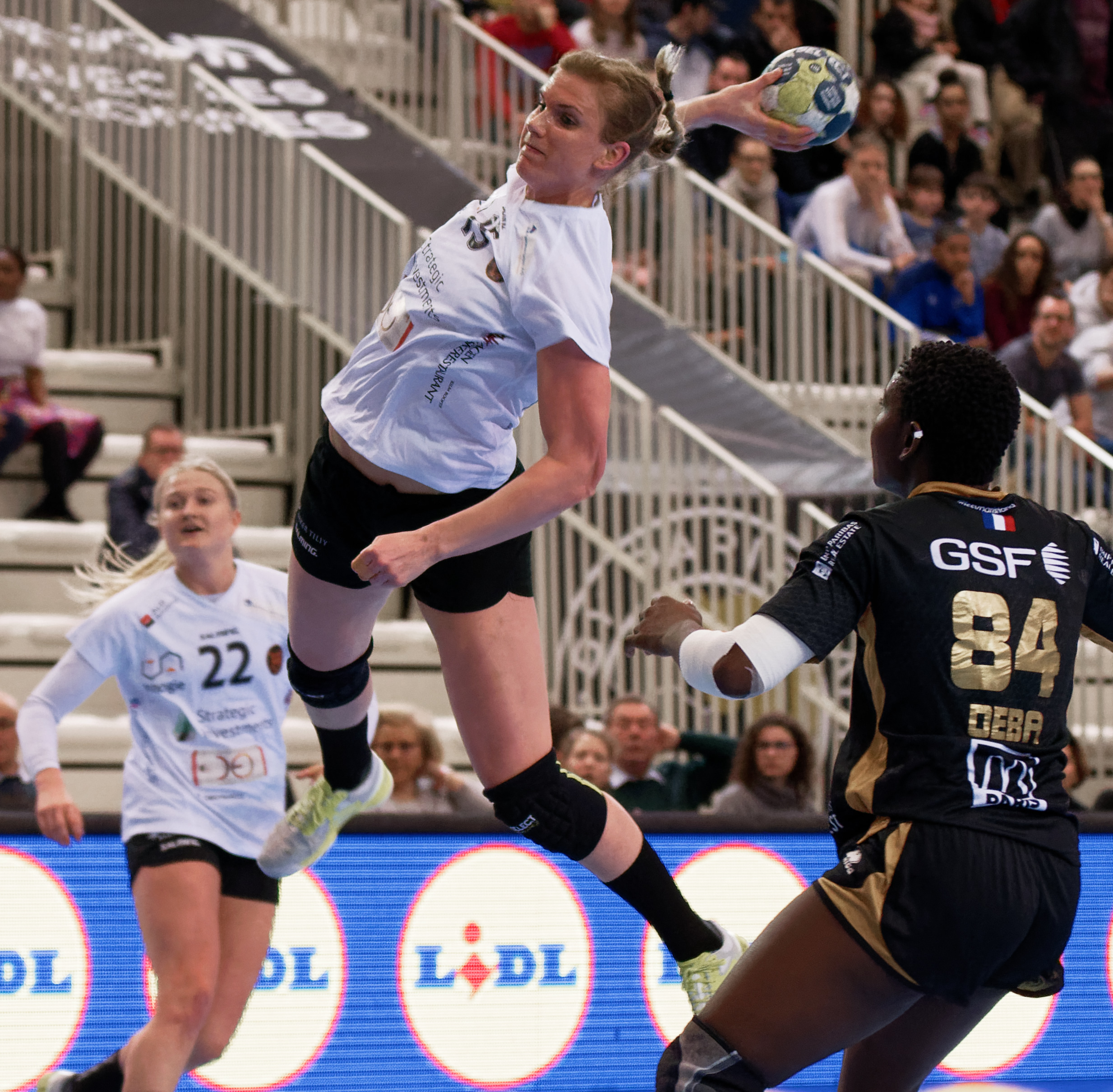 Rencontre du tour principal de la coupe EHF entre Issy Paris Hand et les danoises de Copenhague. A Issy Les Moulineaux, le 28 janvier 2018.